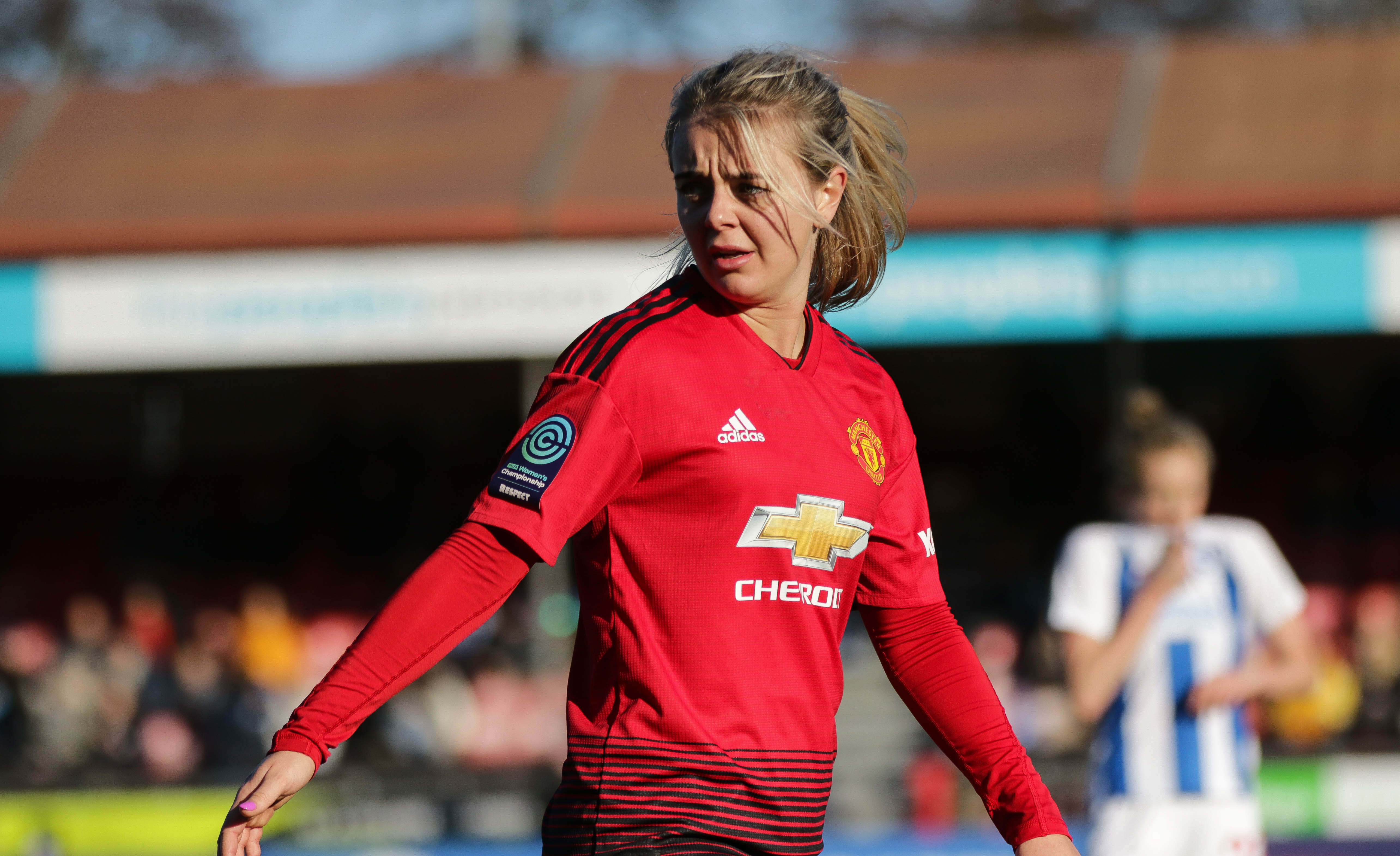 Mollie Green